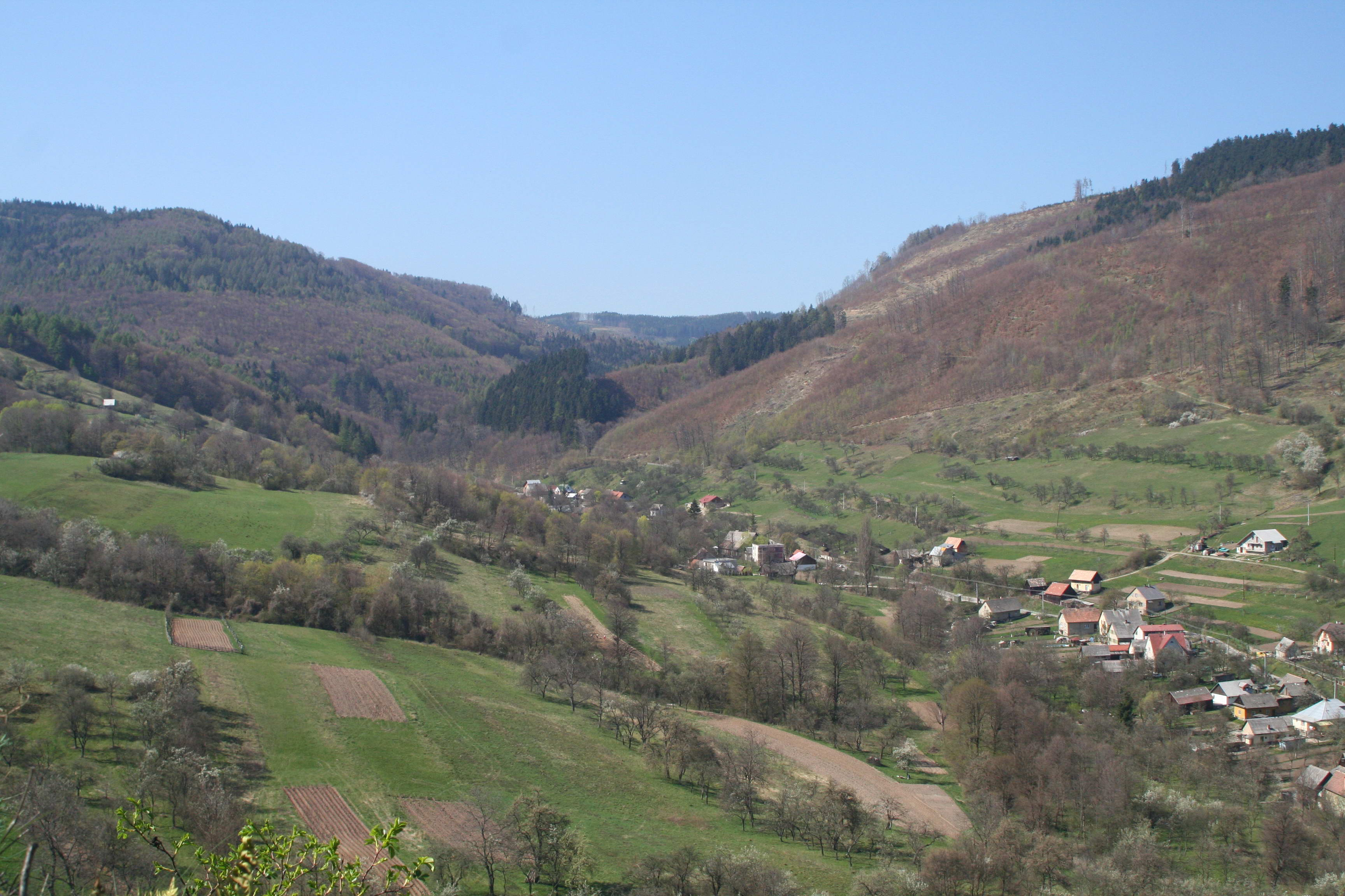 Horní část obce Lednica